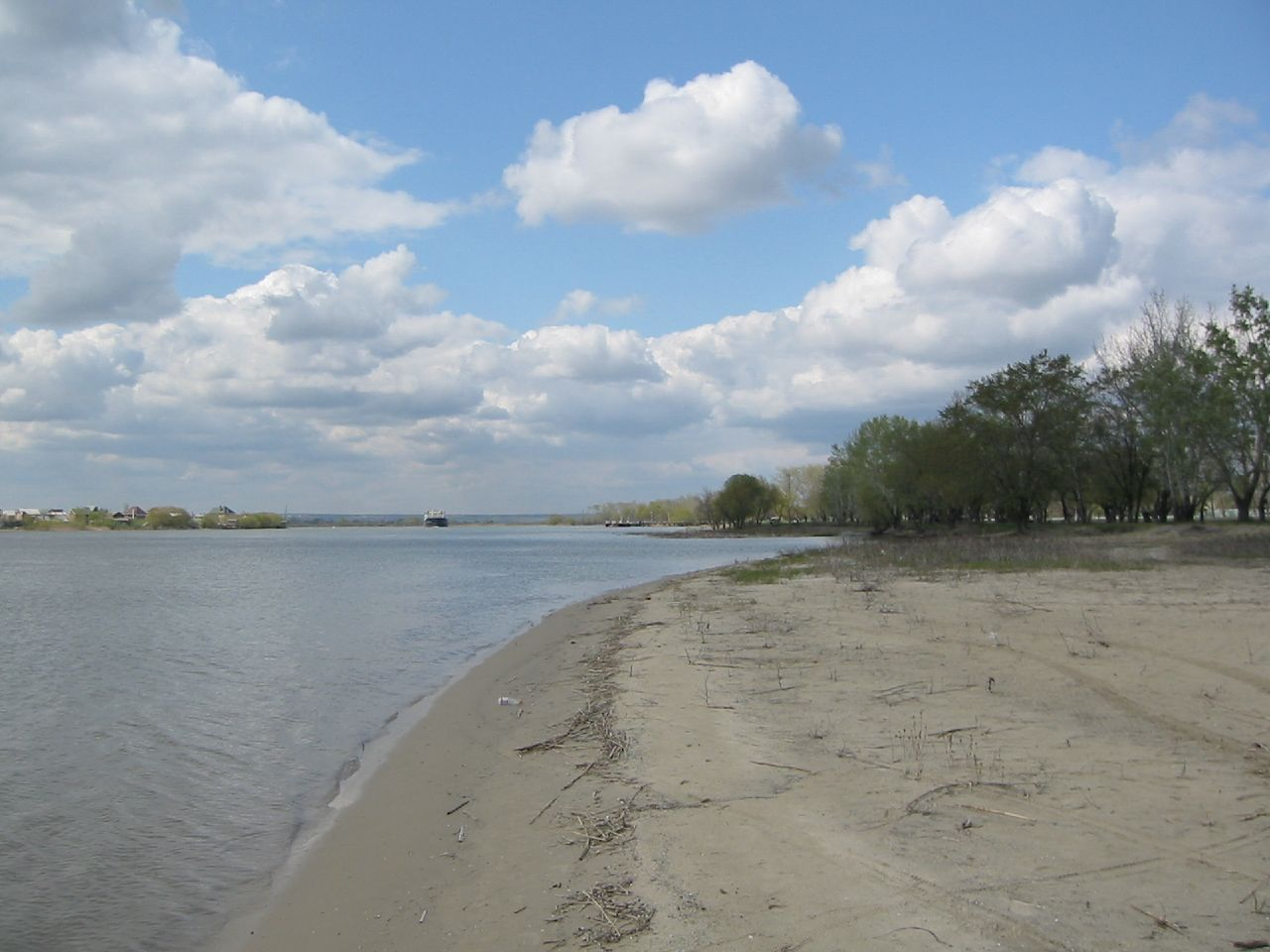 River Don near Starocherkassk, Russia